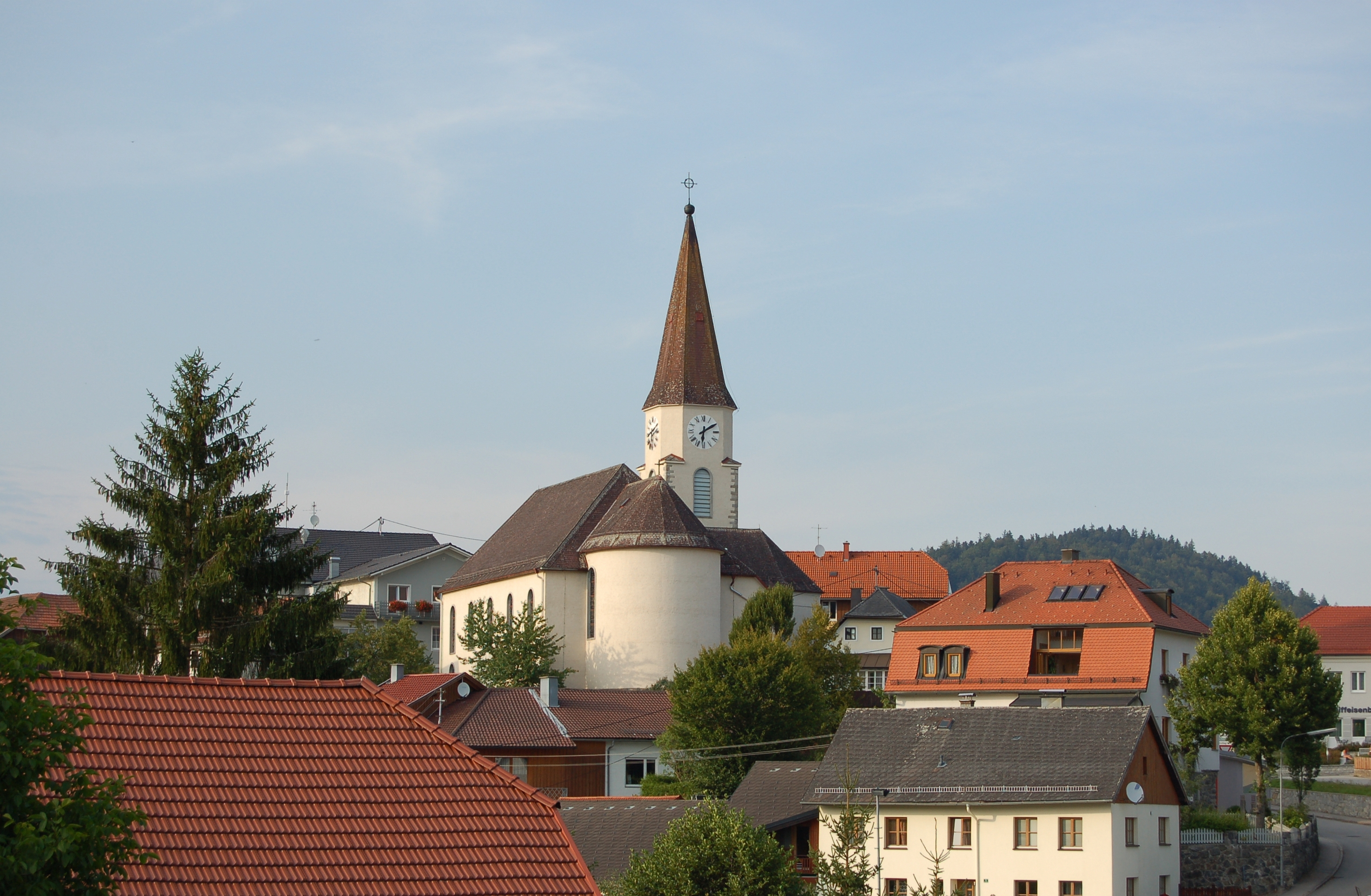 Die Pfarrkirche von Oberkappel im Bezirk Rohrbach (Oberösterreich) wurde 1256 als Filialkirche urkundlich erwähnt. Der gotische Vorgängerbau wurde abgebrochen und zwischen 1955 und 1956 unter Verwendung des spätgotischen Chors aus der Zeit um 1500 durch einen Neubau nach Plänen von Hans Feichtlbauer ersetzt.